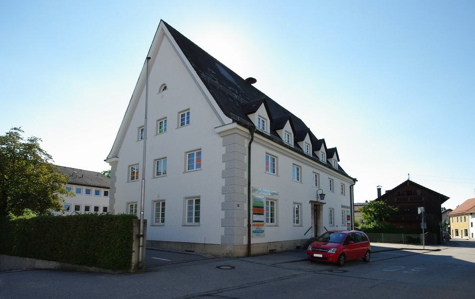 Poststr. 13, 83317 TeisendorfThis is a photograph of an architectural monument.